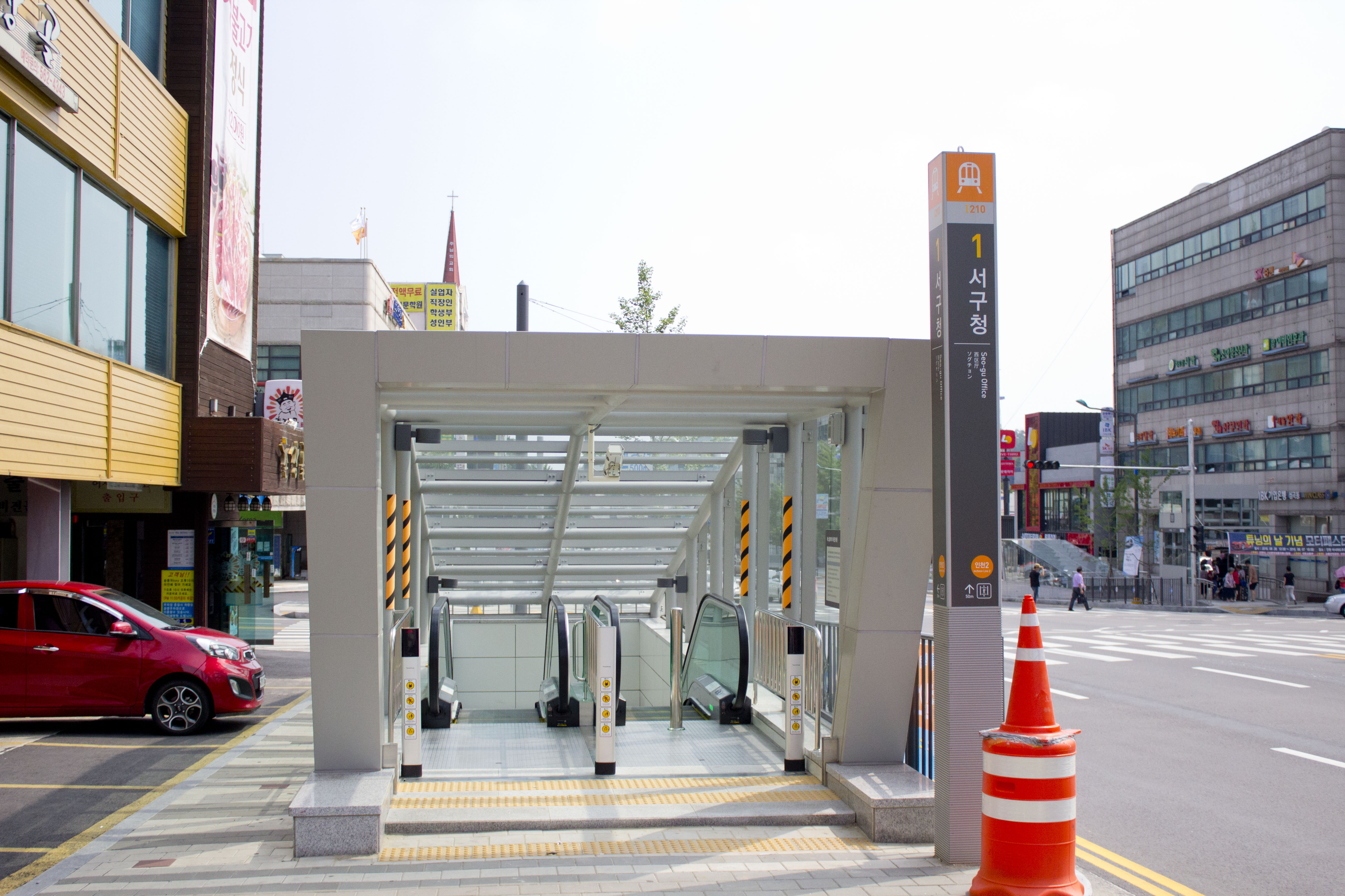 인천2호선 서구청역 1번 출구